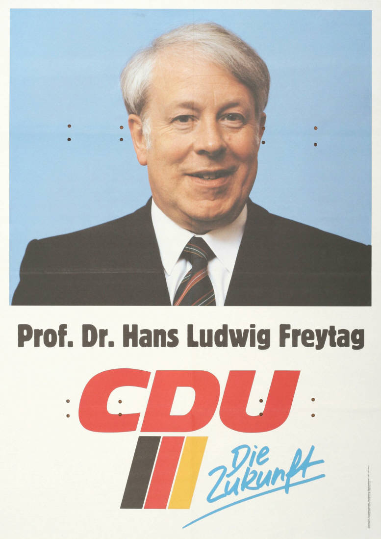 Prof. Dr. Hans Ludwig Freytag CDU Die Zukunft Abbildung: Porträtfoto Plakatart: Kandidaten-/Personenplakat mit Porträt Auftraggeber: Verantw.: CDU-Bundesgeschäftsstelle, Hauptabteilung Öffentlichkeitsarbeit, Konrad-Adenauer-Haus, Bonn Drucker_Druckart_Druckort: Willy F.P. Fehling GmbH, Hannover Objekt-Signatur: 10-001: 2987 Bestand: Plakate zu Bundestagswahlen (10-001) GliederungBestand10-18: Plakate zu Bundestagswahlen (10-001) » Die 11. Bundestagswahl am 25. Januar 1987 » CDU » Mit Porträtfoto Lizenz: KAS/ACDP 10-001: 2987 CC-BY-SA 3.0 DE